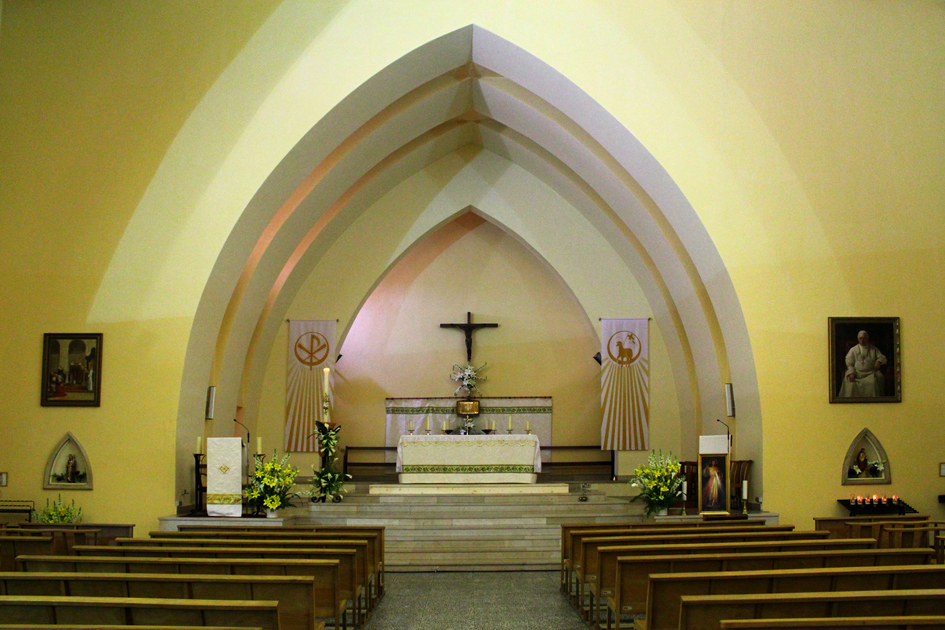 L'église Saint-Pie X à Toulon. Nef et choeur. Fêtes de Pâques 2011.